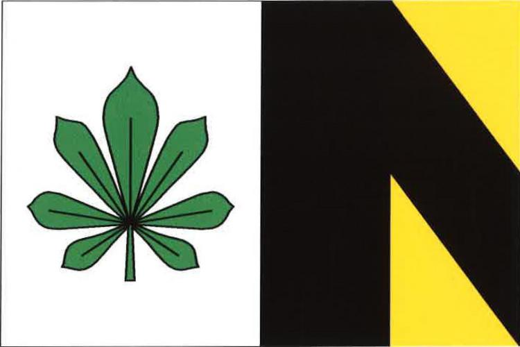 Liblice vlajka